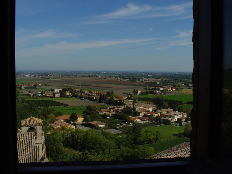 Parma, Emilia Romagna, Italia